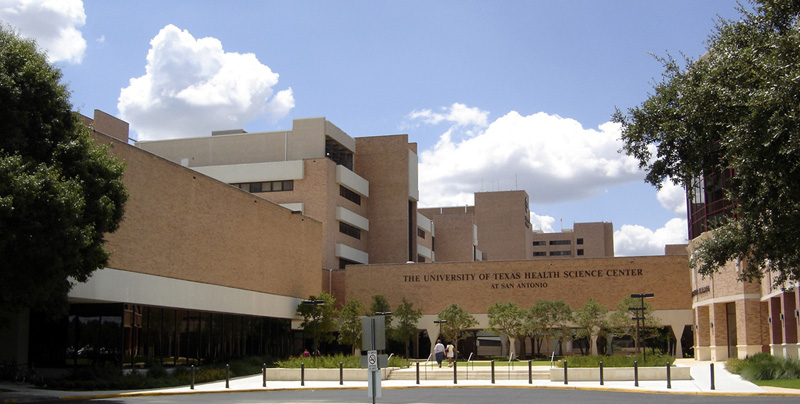 UTHSCSA